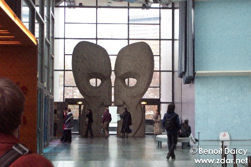 Photos de l'exposition "Pink Floyd Interstellar" à la Cité de la Musique (Porte de la Villette, Paris). Read the story at . Lire le compte-rendu de l'expo sur